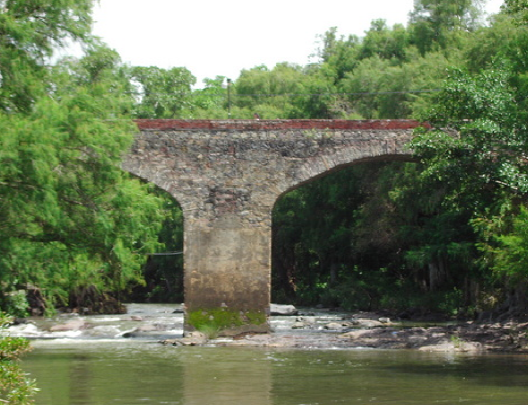 Puente que divide la comunidad de turicato en lado del rio caliente y lado del rio frio